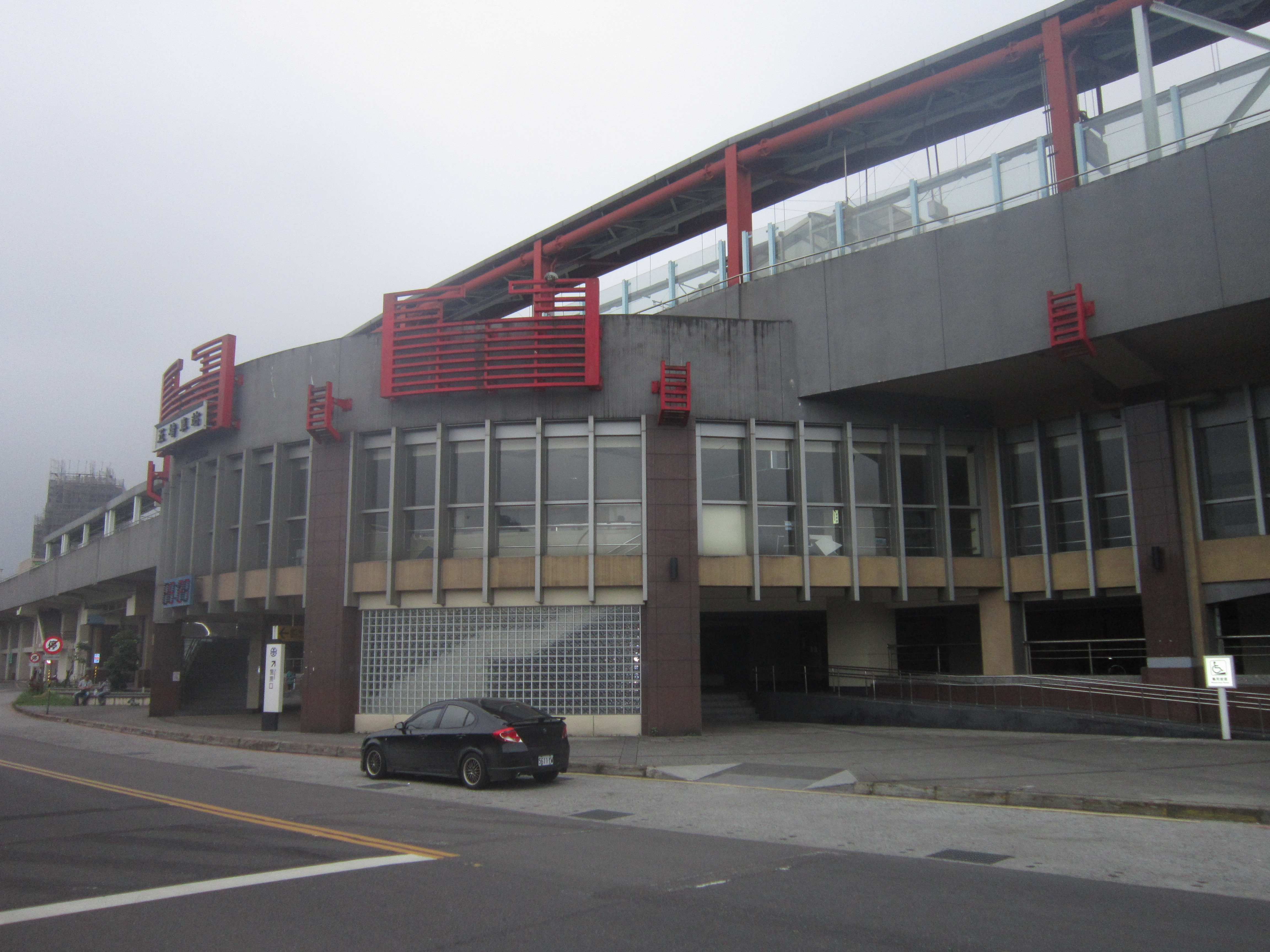 臺灣鐵路管理局五堵車站鄉長路方向出入口。